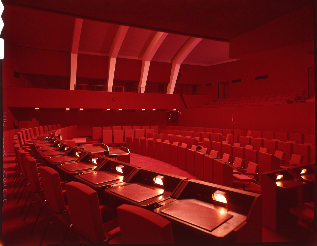 Genova, Palazzo Doria Tursi, aula del consiglio comunale di Genova (c.d. "sala rossa"), realizzata su progetto dell'architetto Franco Albini. Servizio fotografico : Genova, 1963 / Paolo Monti. - Buste: 1, Fototipi: 1 : Diapositiva, sviluppo cromogeno/ pellicola ; 10x12. - ((Serie costituita da 1 diapositiva identificata con il n.: 1161. La suddetta serie è contenuta nella scatola identificata con la numerazione GC1155/11741. Sul coperchio della scatola manoscritto: "Negative con Diapositiva.". - Fonte: Rubrica di Paolo Monti: Archivio fino 1-4-1961/ 31-3-1963 (1961-1963), presso Archivio Paolo Monti. - Fonte: Agenda di Paolo Monti: R 1 - Monti/ 1 aprile 1963 - 6 giugno 1964/ 6000-8193 (1963-1964), presso Archivio Paolo Monti